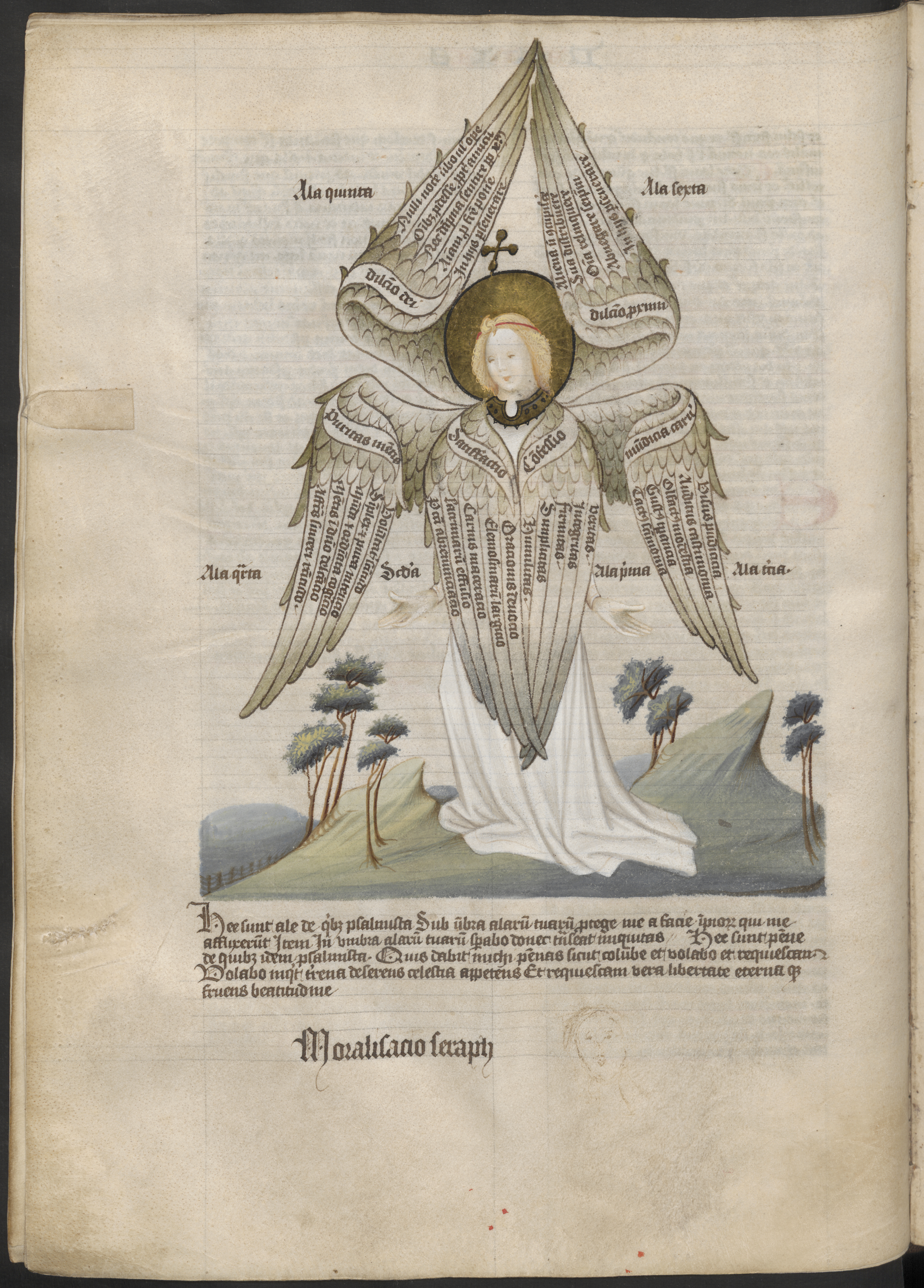 Hs. 252, f. 43v. Moralisacio Seraph.